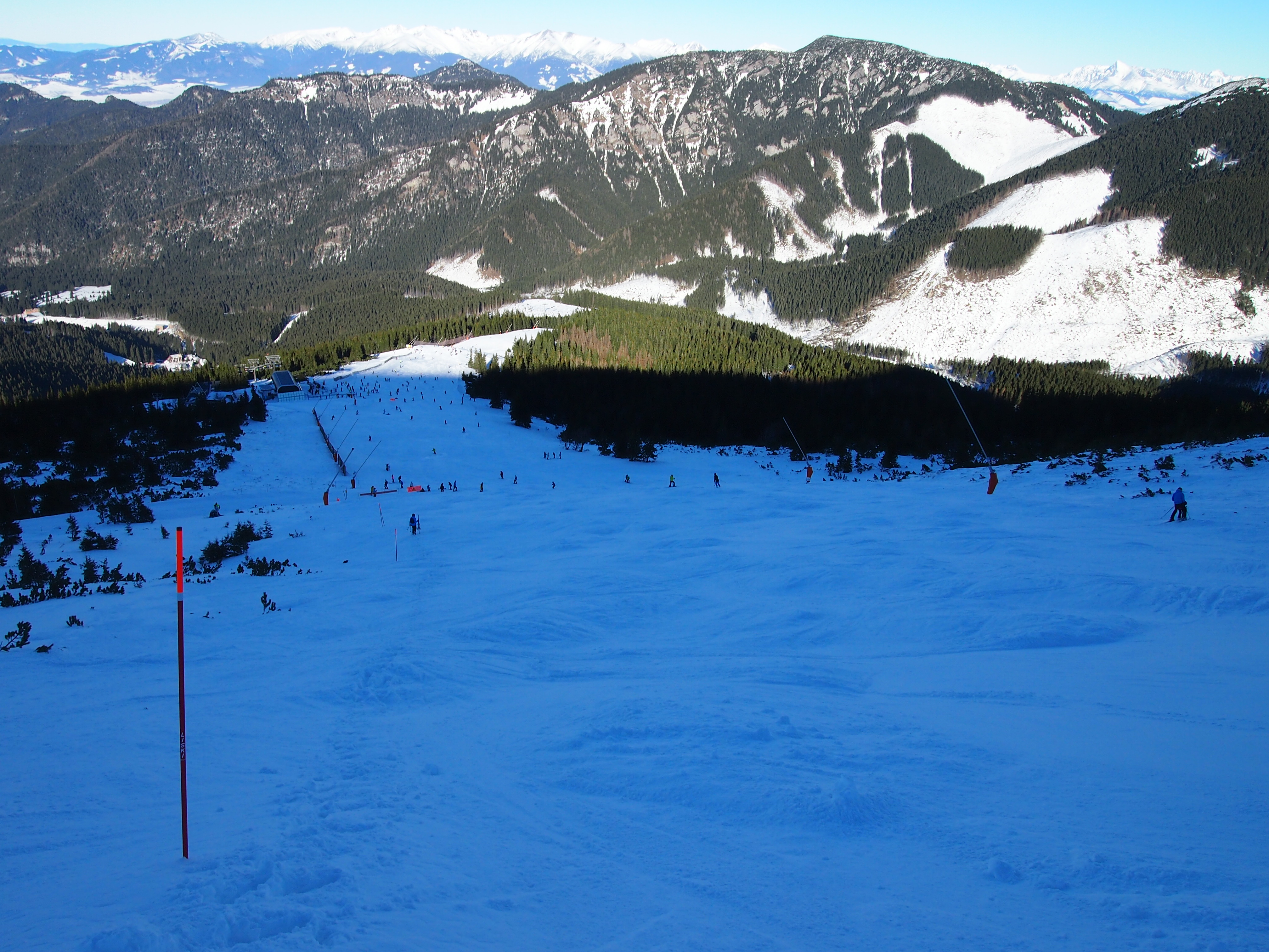 KRAKOWA HALA WIDZIANA Z TRASY NR 11 NA STOKACH CHOPOKA